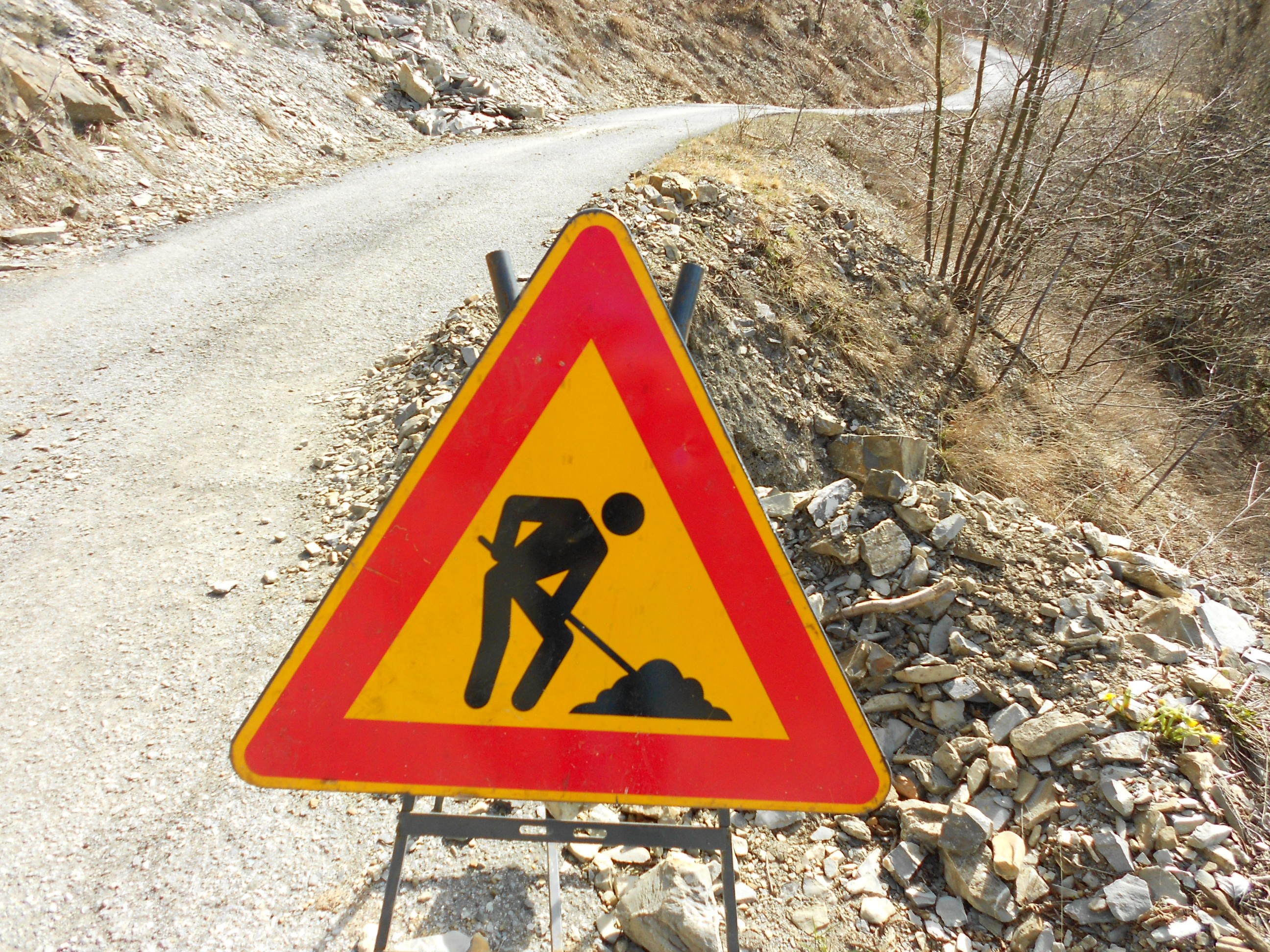 cartello segnaletico verticale provvisorio (mobile) indicante segnale di pericolo per lavori stradali in corso